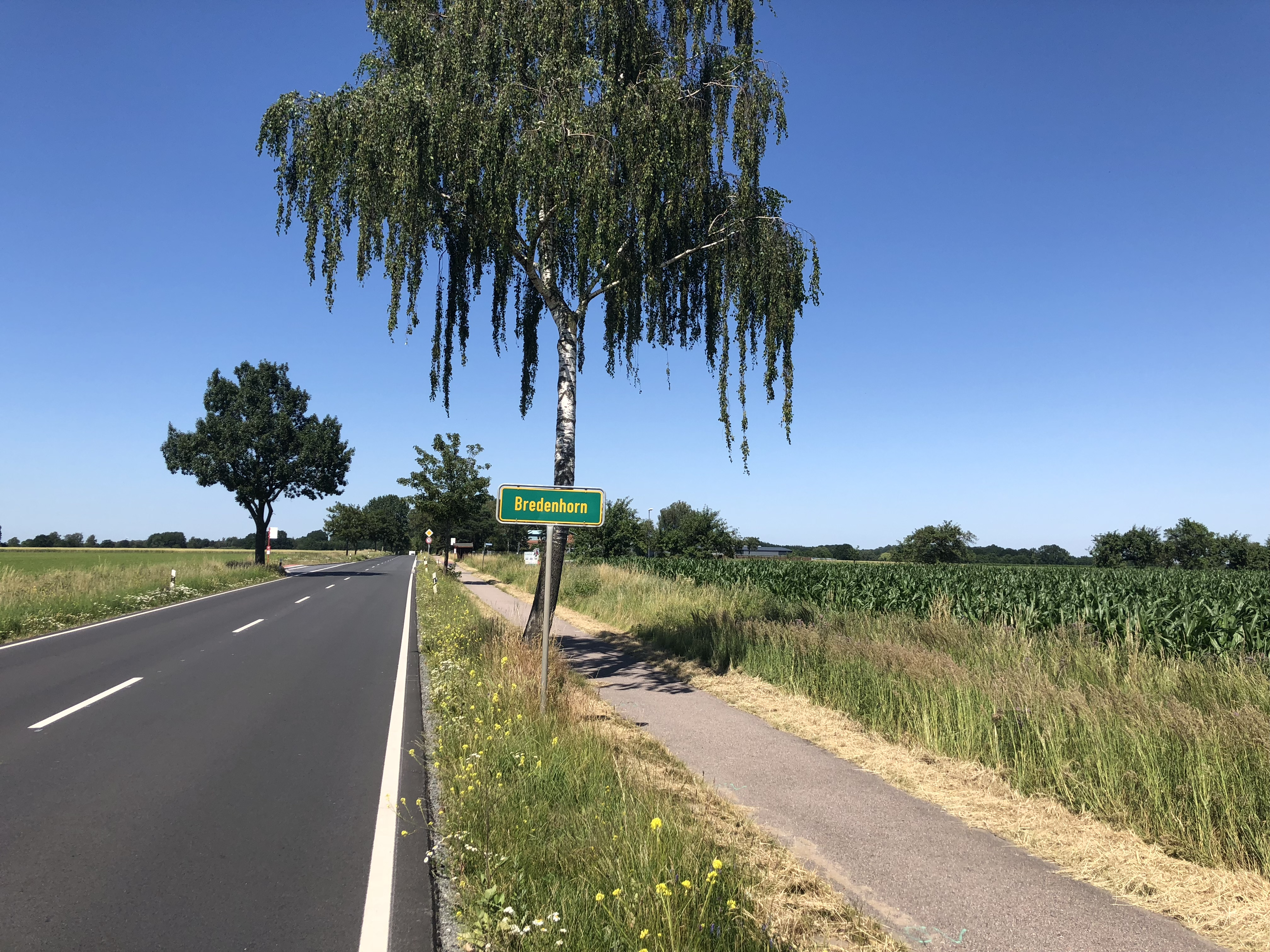 Oortsschild Bredenhoorn an de Landsstraat 130